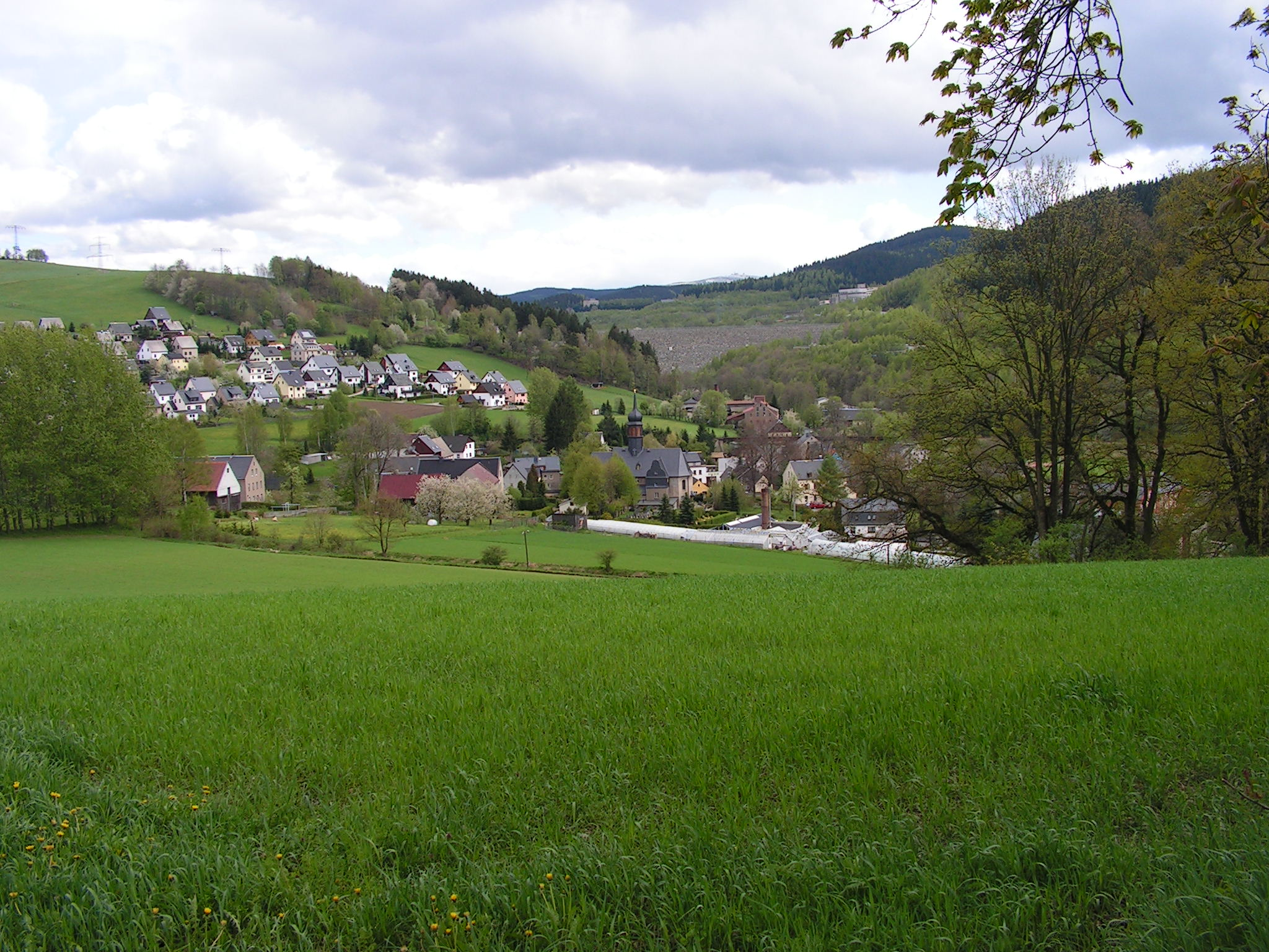 Blick über die Ortsmitte von Markersbach zur Staumauer des Pumpspeicherwerks